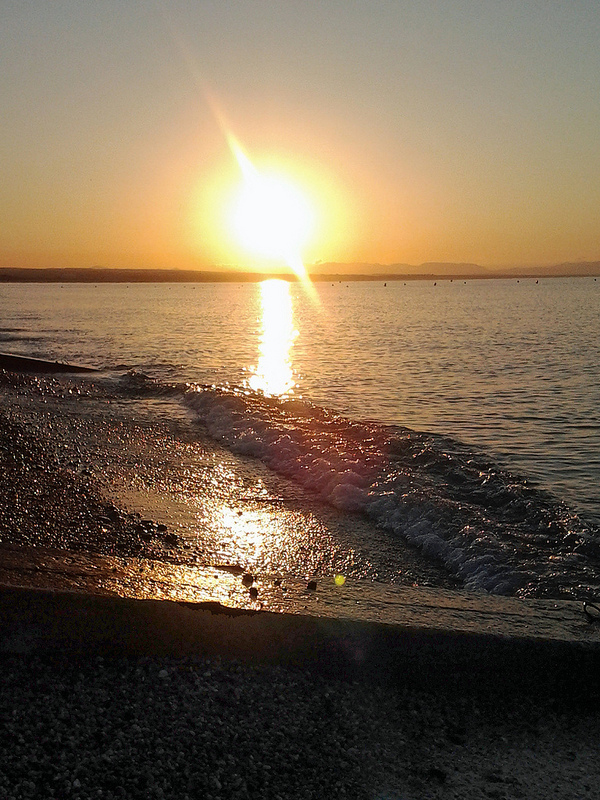 Una solución para la playa de Costacabana